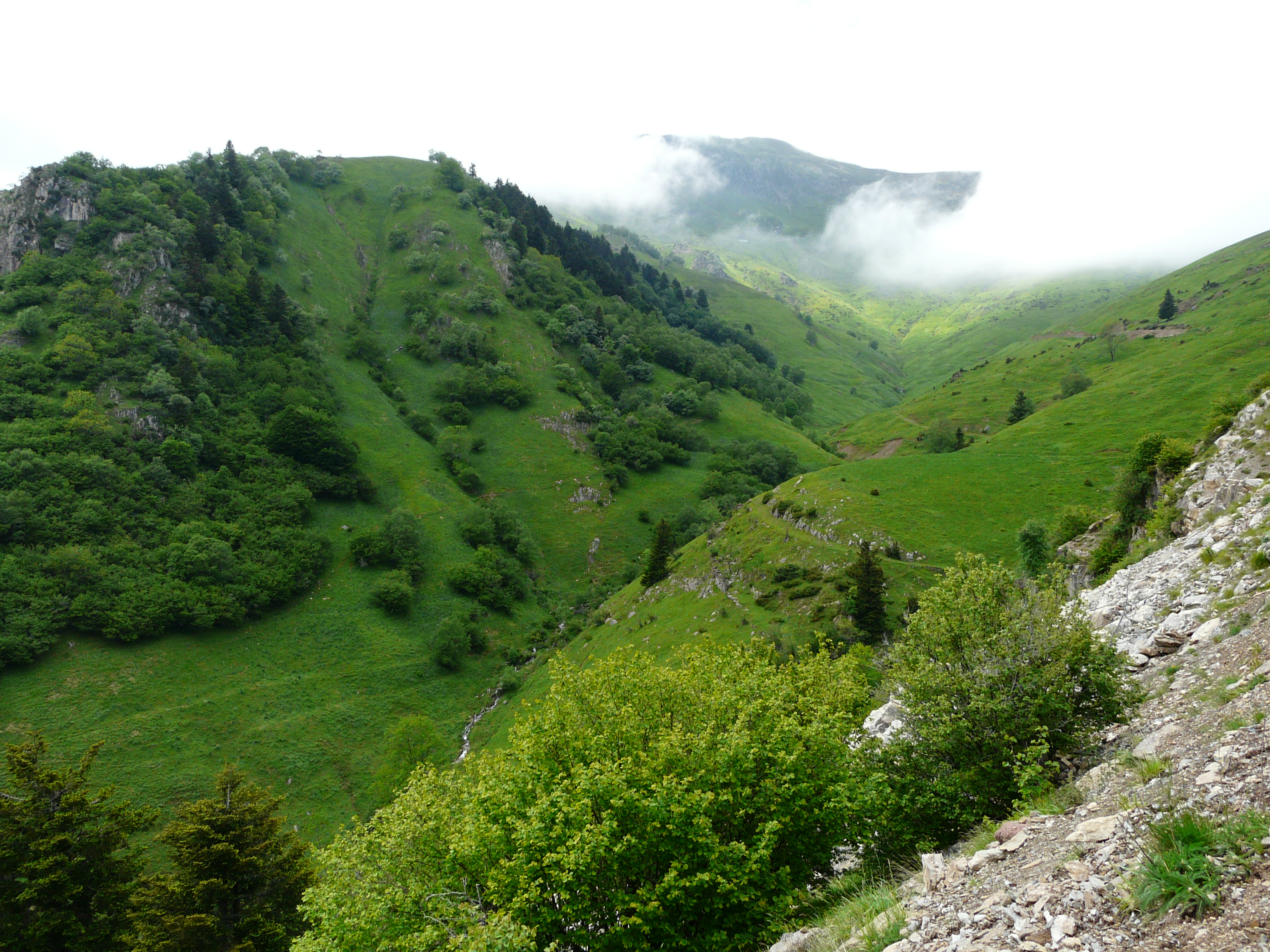 Le vallon du ruisseau de Colantigue (branche-mère de la Neste d'Oueil), Bourg-d'Oueil, Haute-Garonne, France.